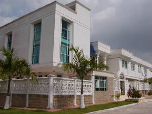 Templo Gran Logia Nacional de Colombia con sede en Barranquilla, en la ciudad de Barranquilla, Colombia